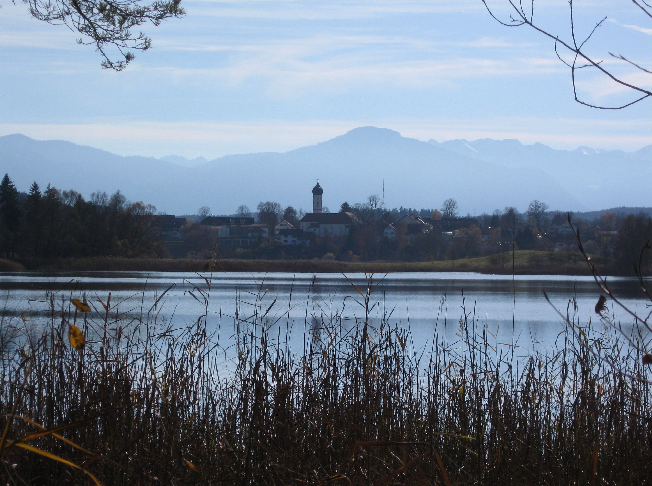 Iffeldorf, Fohnsee